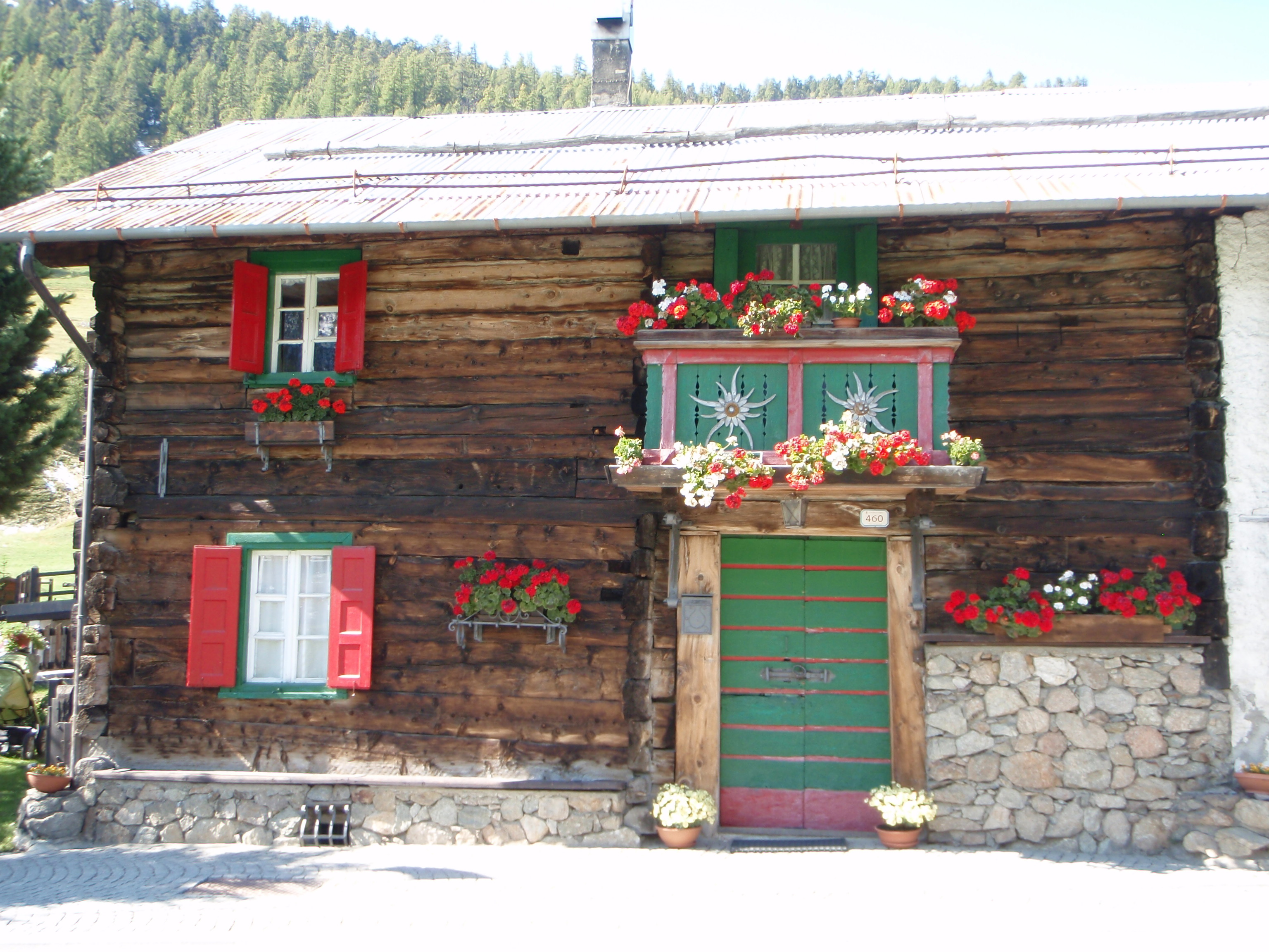 tipica baita livignasca